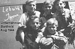 Glatz/Schlesien, Hauptbahnhof. HJ-Sonderzug vor der Abfahrt zum Unternehmen Barthold. Pfeil: Autor. August 1944, Erinnerungsfoto. (Pfeil Autor.)